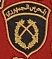 Logo de la garde républicaine